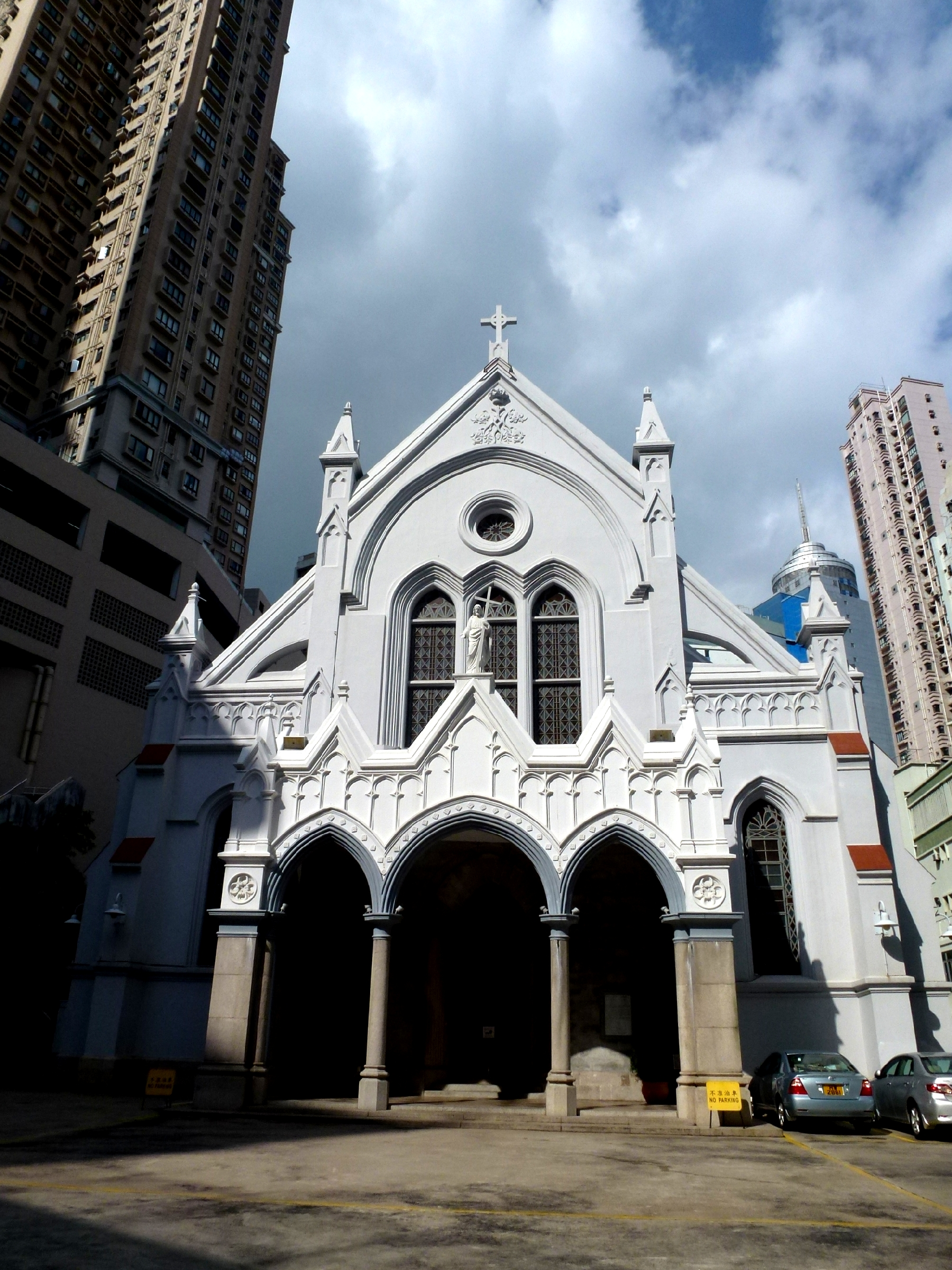 Hong Kong Catholic Cathedral Hong Kong